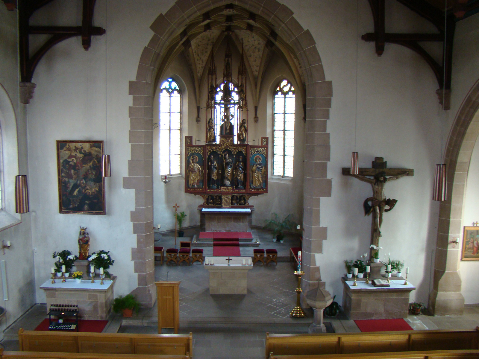 St. Ulrich in Stockheim